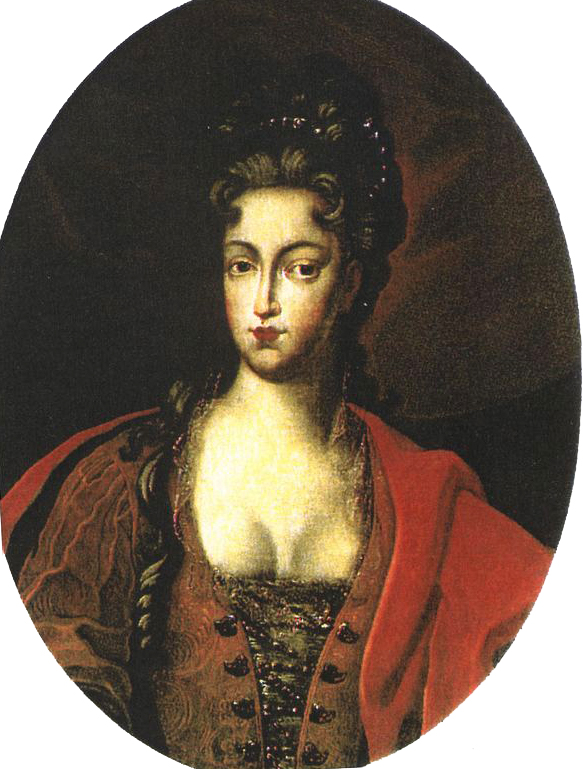 Ritratto di Carlotta Aglae di Borbone-Orléans (1700-1761), moglie di Francesco III d'Este, duca di Modena e Reggio e di fatto Massa Carrara, col dominio della Garfagnana. Duchessa dal 1737 al 1761.